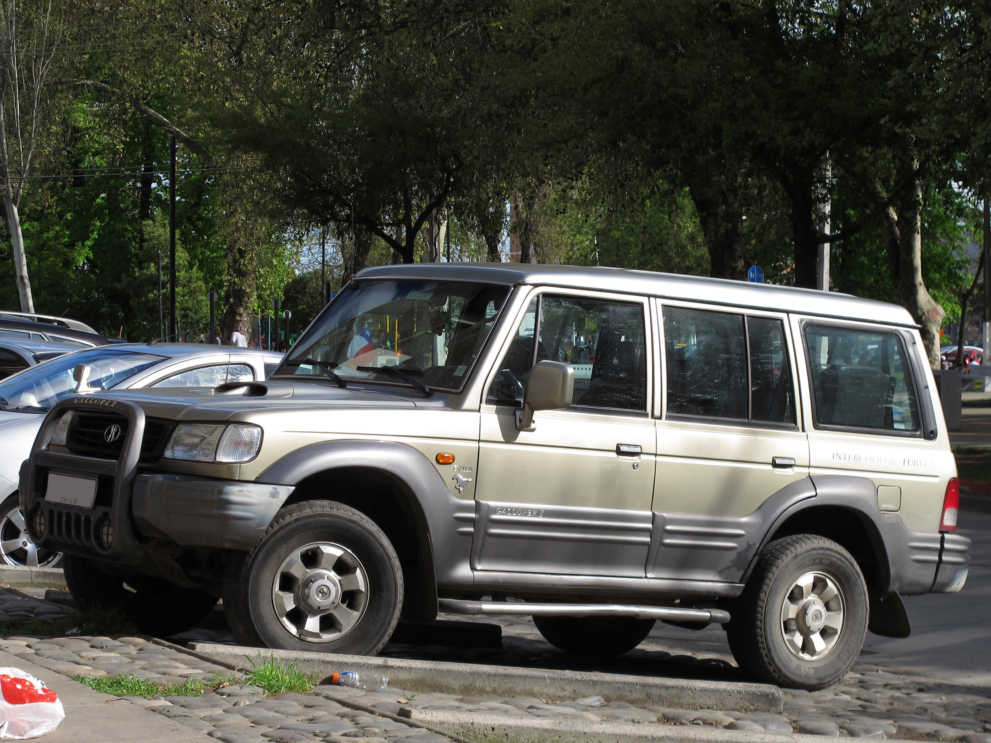 Hyundai Galloper II Exceed 2.5d Turbo 2001